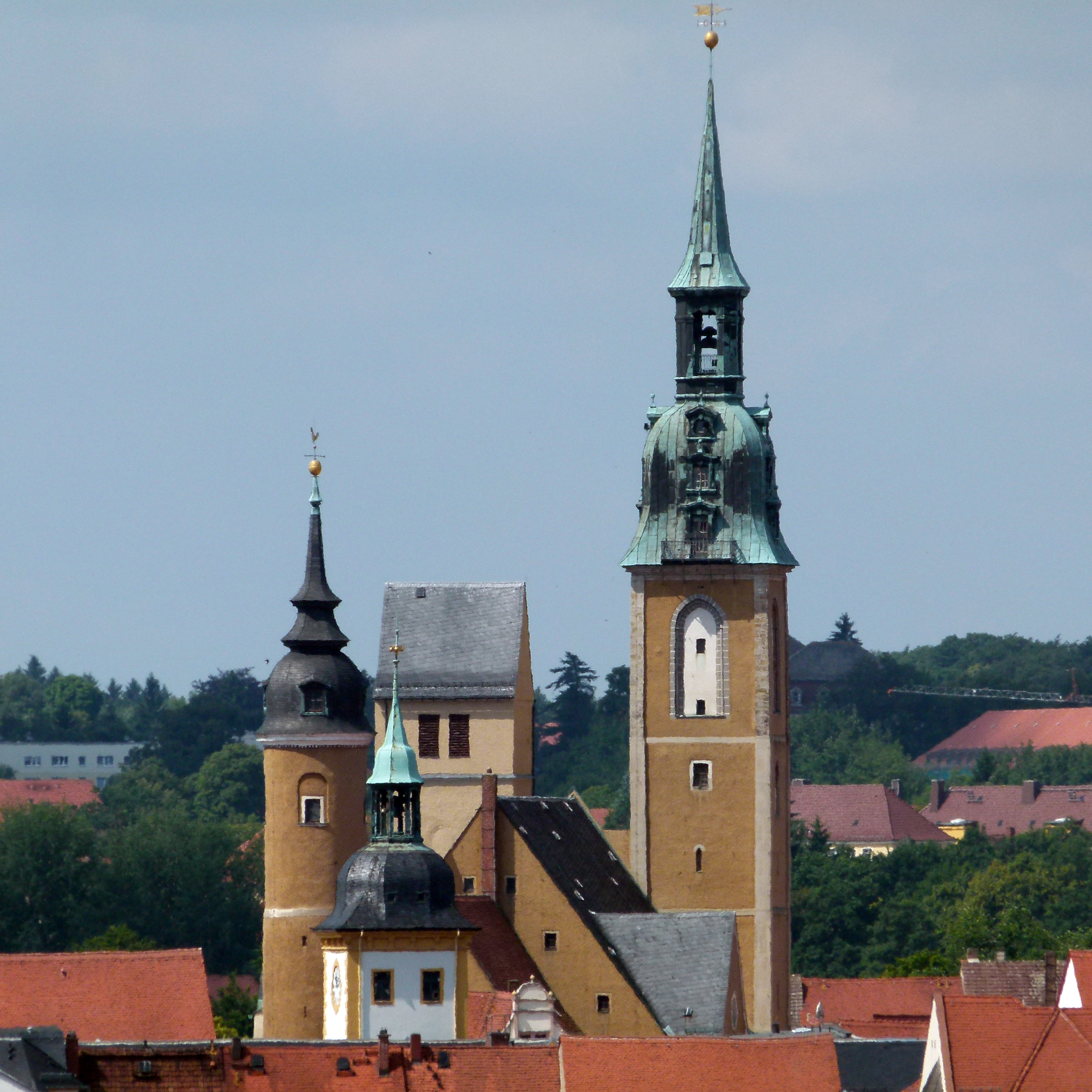 Petrikirche, Freiberg, Sachsen